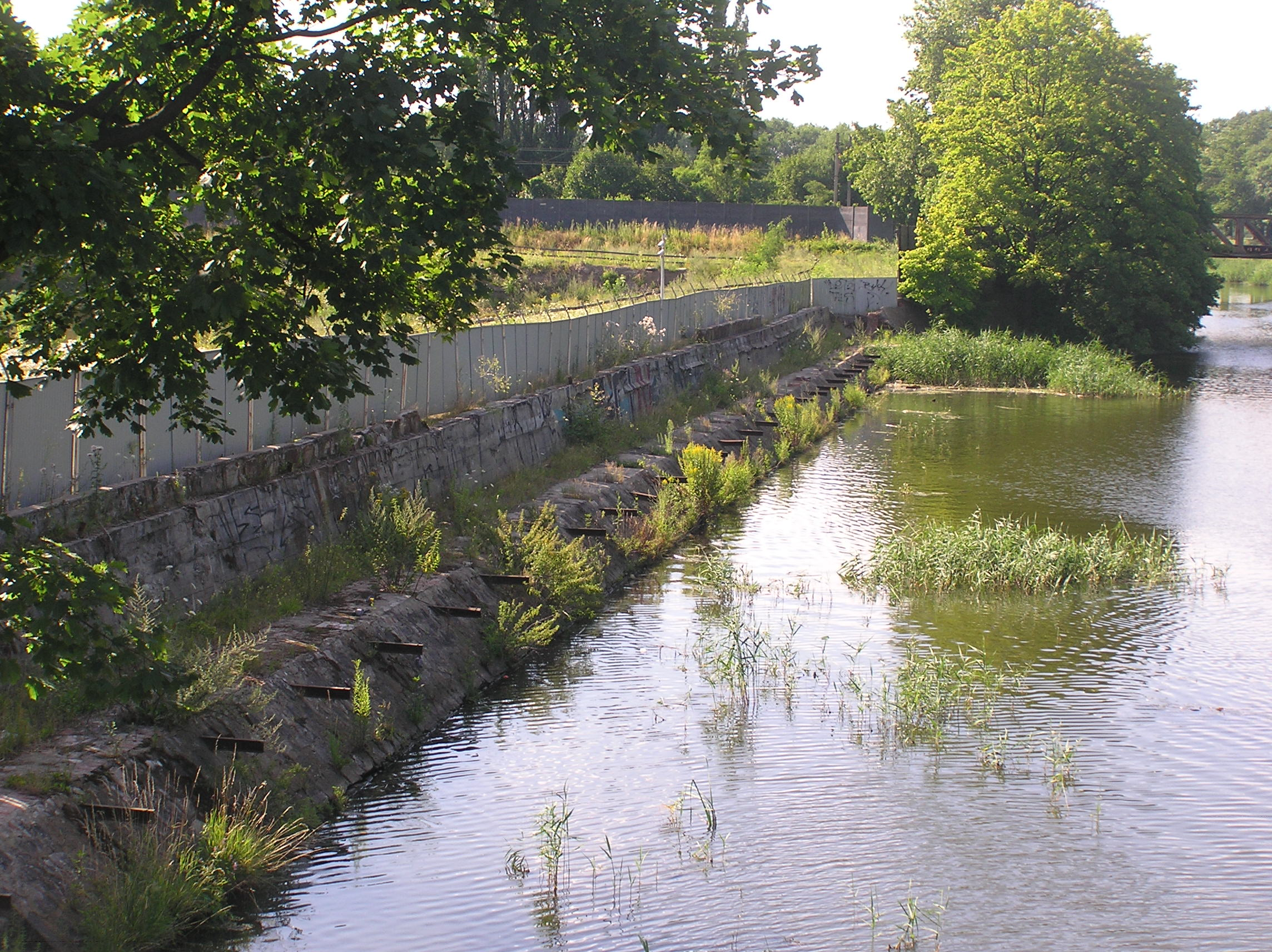 Wrocław, Kanał Miejski, Nabrzeże Browaru Piastowskiego